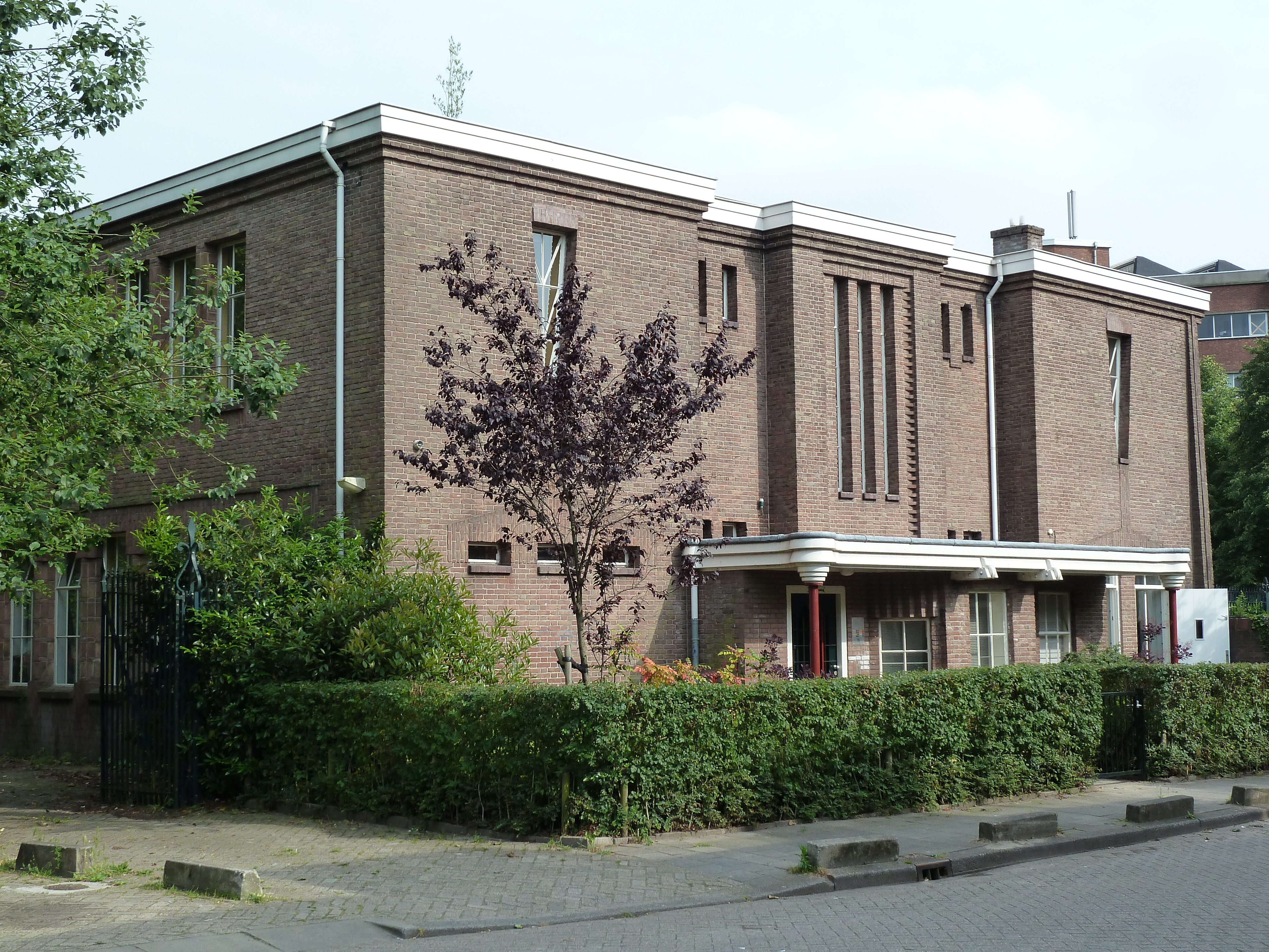 Ketelhuis bij Griftpark, Stieltjesstraat 76A, Utrecht, NL.